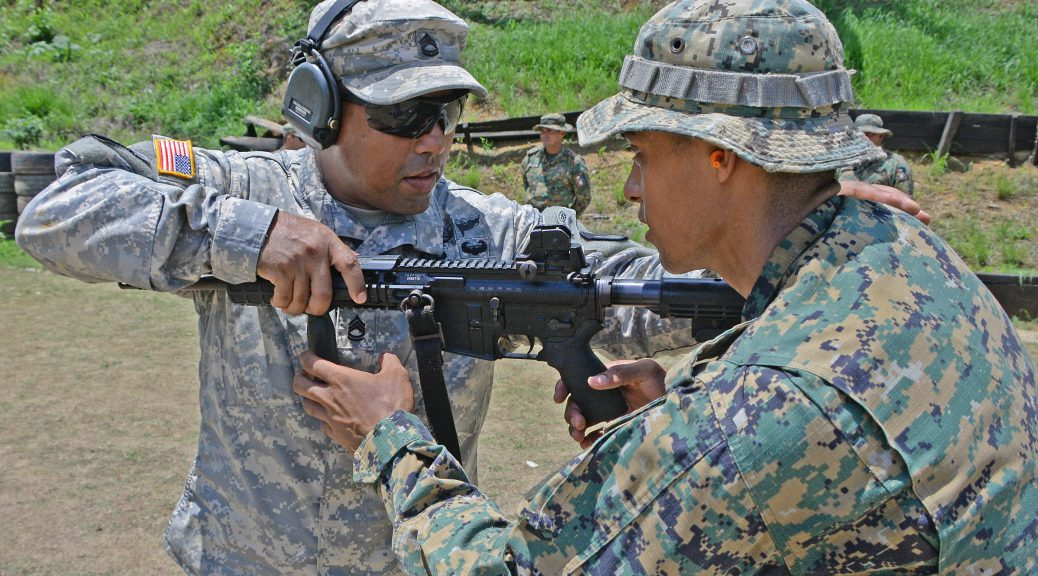 Soldados de Estados Unidos entrenan a miembros del Servicio Nacional de Fronteras.